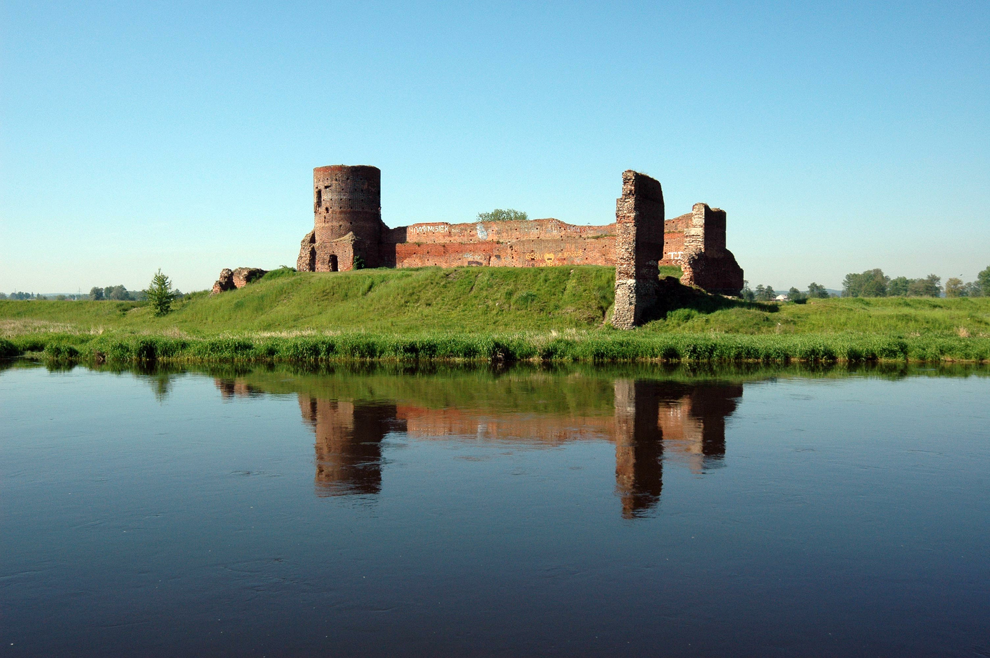 Ruiny zamku w Kole.